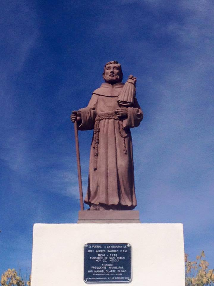 Fray Andrés Ramírez, Fundador de Cd. Meoqui, Chihuahua